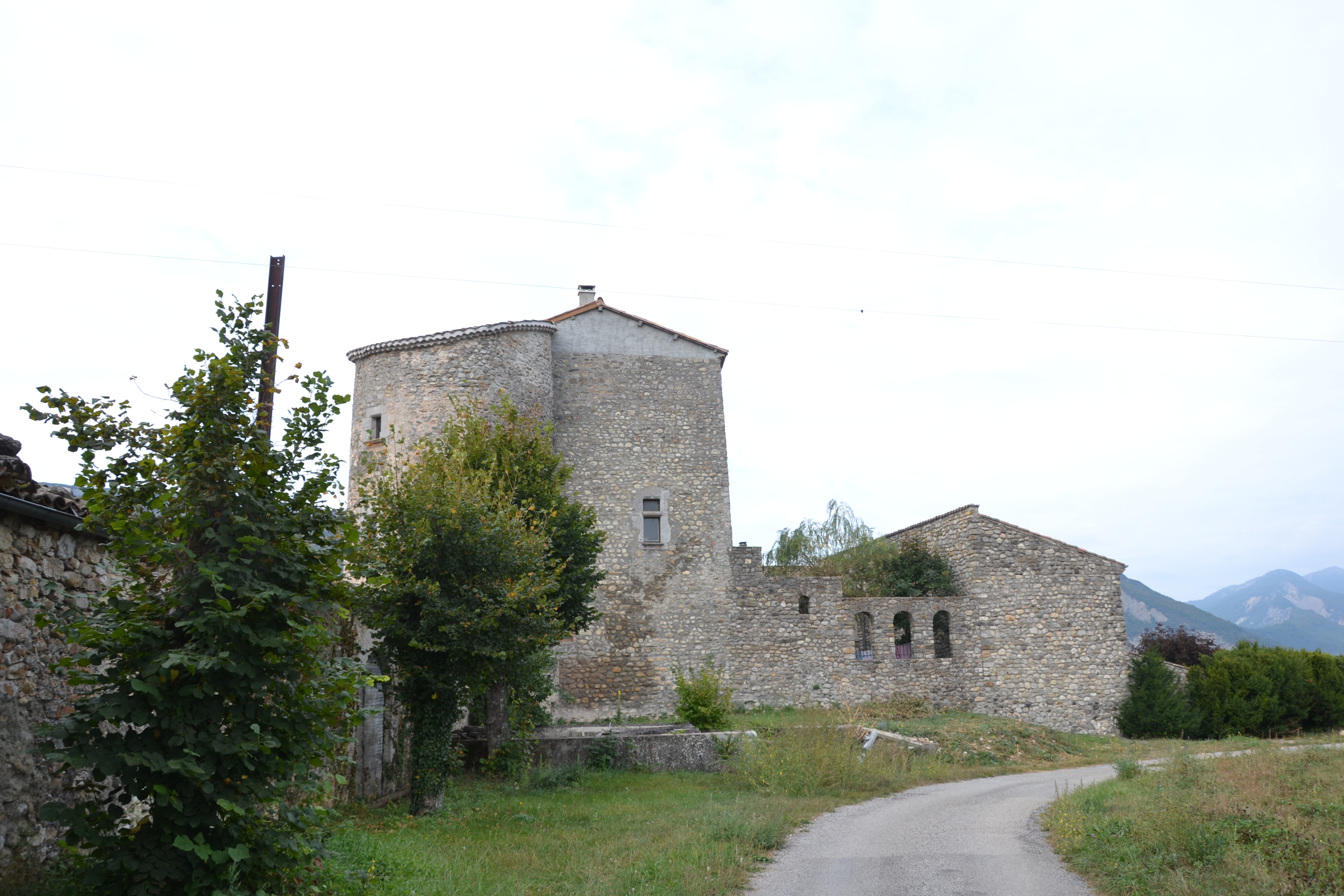 Chateau de La Bâtie-Montsaléon